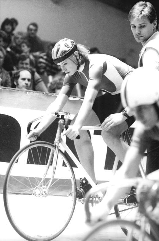 Anett Neumann, Detlef Ulbel ADN-ZB Mittelstädt 14.1.89 Berlin: XIV. DDR-Bahn-Meisterschaften - Im Sprint der Frauen belegte die Cottbuserin Annett Neumann den ersten Platz. Sie wiederholte damit ihren Vorjahressieg. Trainer Detlef Ulbel schickt hier die Athletin in das Halbfinale.